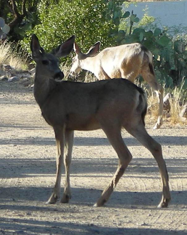 mule_deer venado_bura in Tucson Arizona